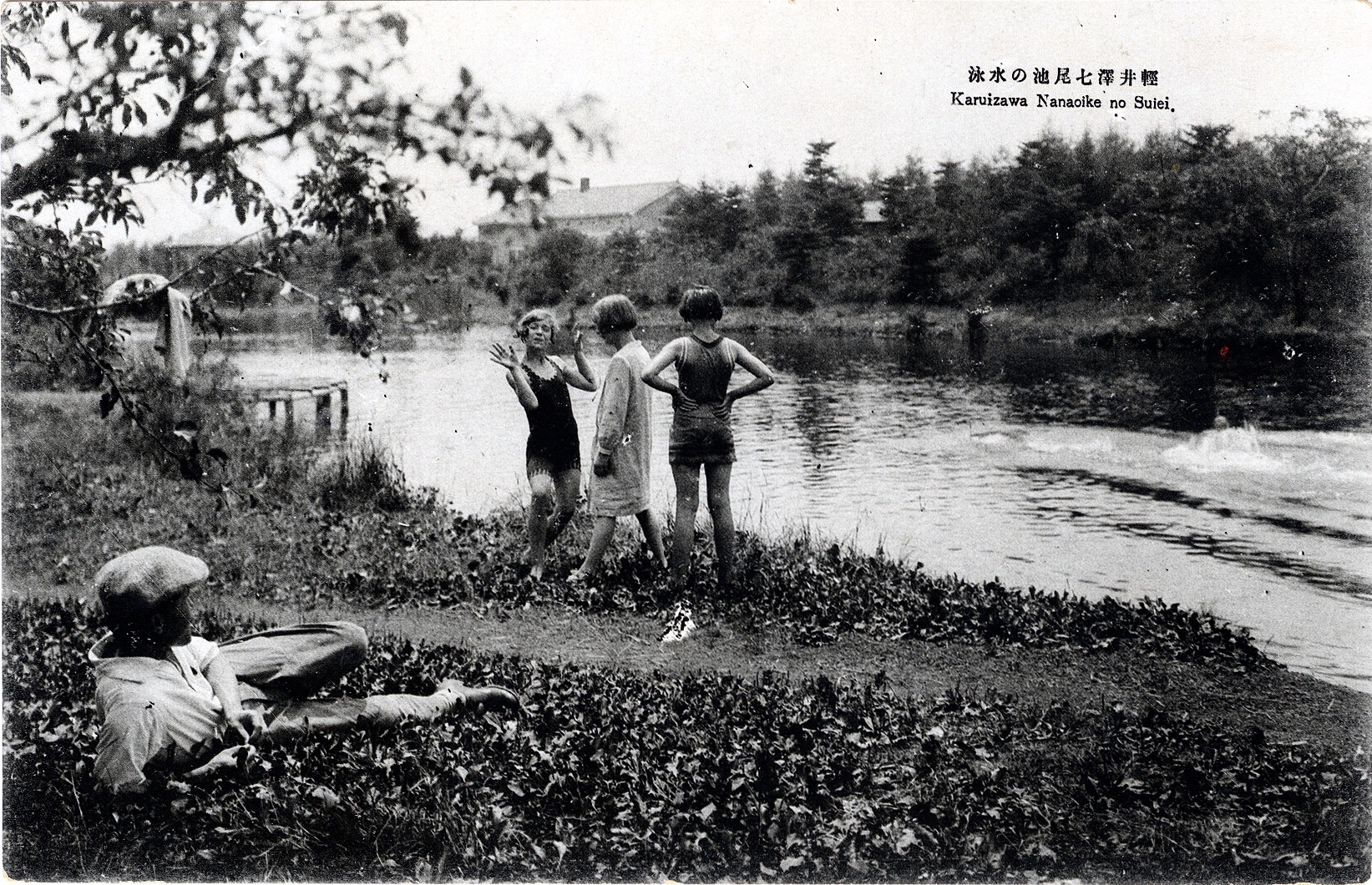 Karuizawa, Nagano, Japan, 1920s